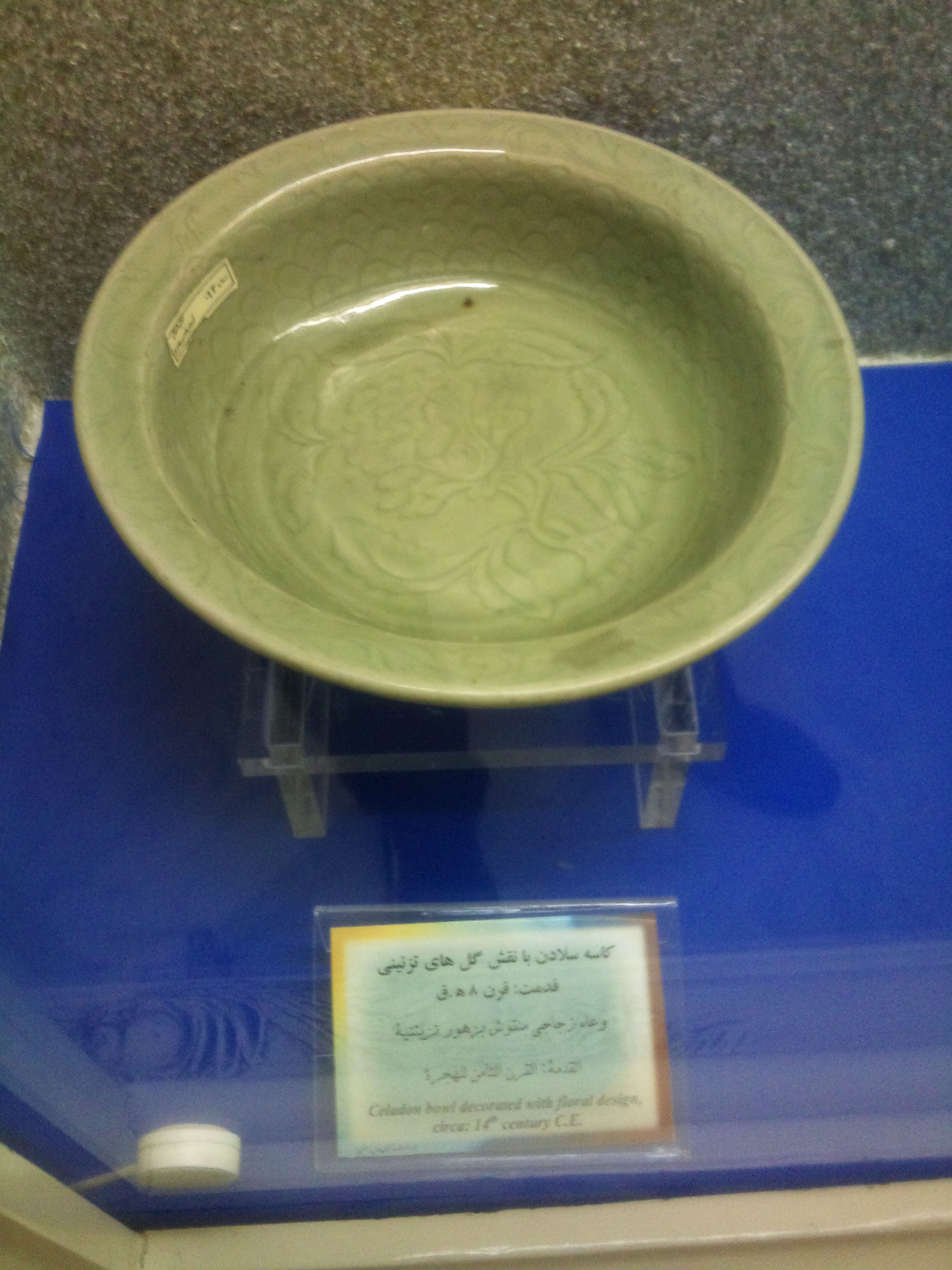 Mashhad museum